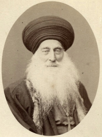 Joseph Audo chaldäisch-katholischer Patriarch von Babylon (Originalfoto, rückseitig mit Namen beschriftet)